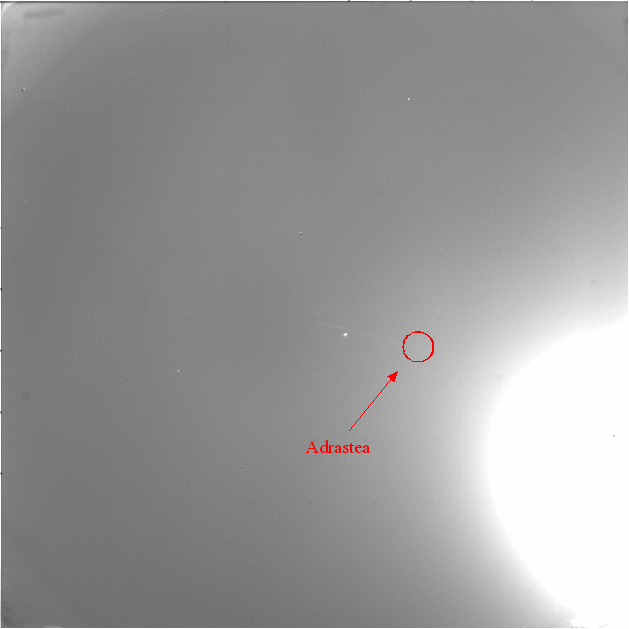 Dit is de foto waarmee in 1979 de maan van Jupiter Adrastea ontdekt werd. De foto is een poging van me om eens een ruwe foto van een ruimtesonde tot een toonbaar geheel te bewerken. De originele foto is op te vragen door op in de vakjes voor FDS-count 20630.5 tot 20630.6 in te typen. Het gatenpatroon heb ik vakkundig verwijderd en de aanwijzing toegevoegd. Adrastea is slechts zichtbaar als een klein stipje. Eind jaren 90 fotograveerde de Galileo een iets groter stipje en tot op de dag van vandaag weten we niet hoe de maan eruit ziet.